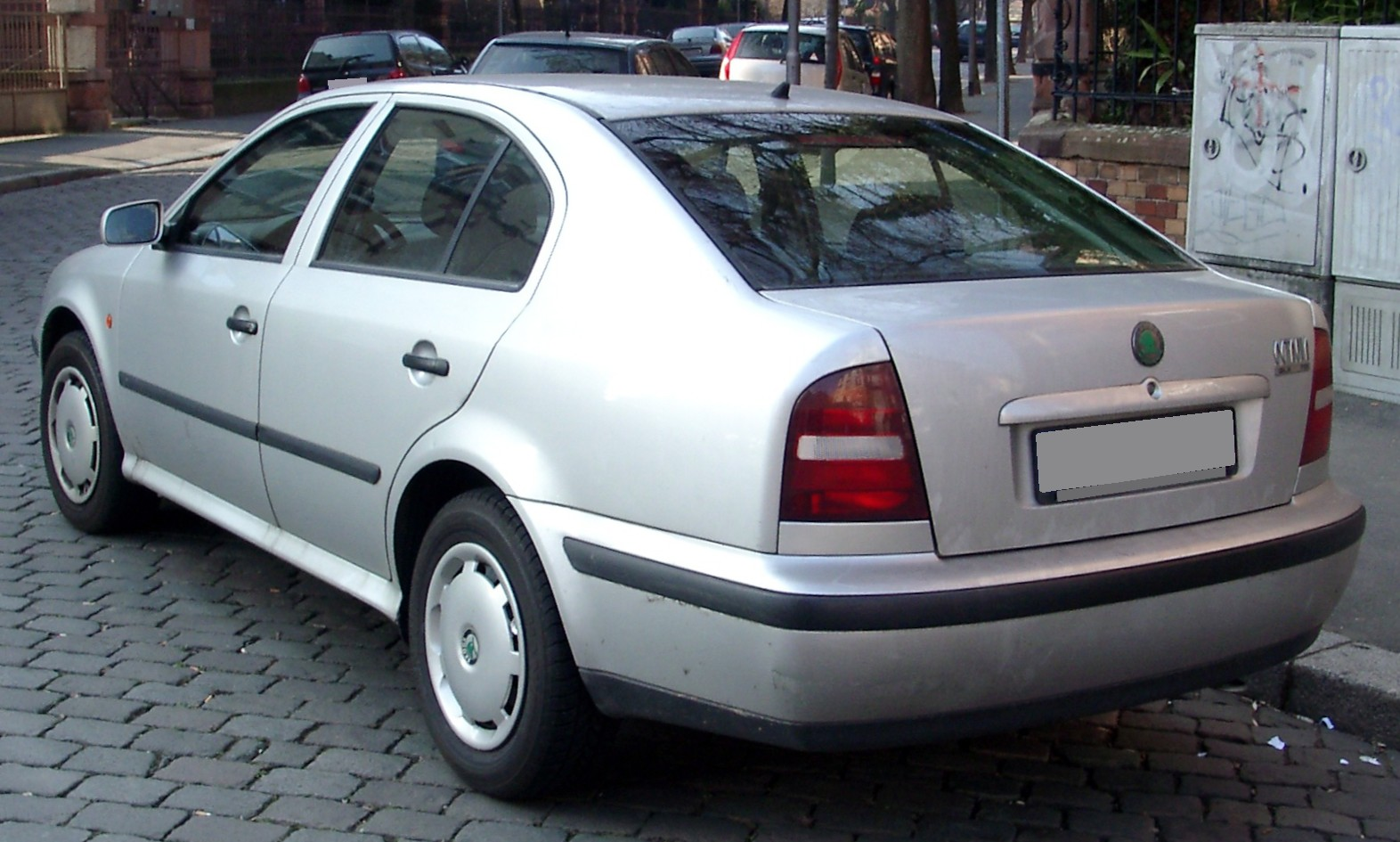 Škoda Octavia, 1. Generation